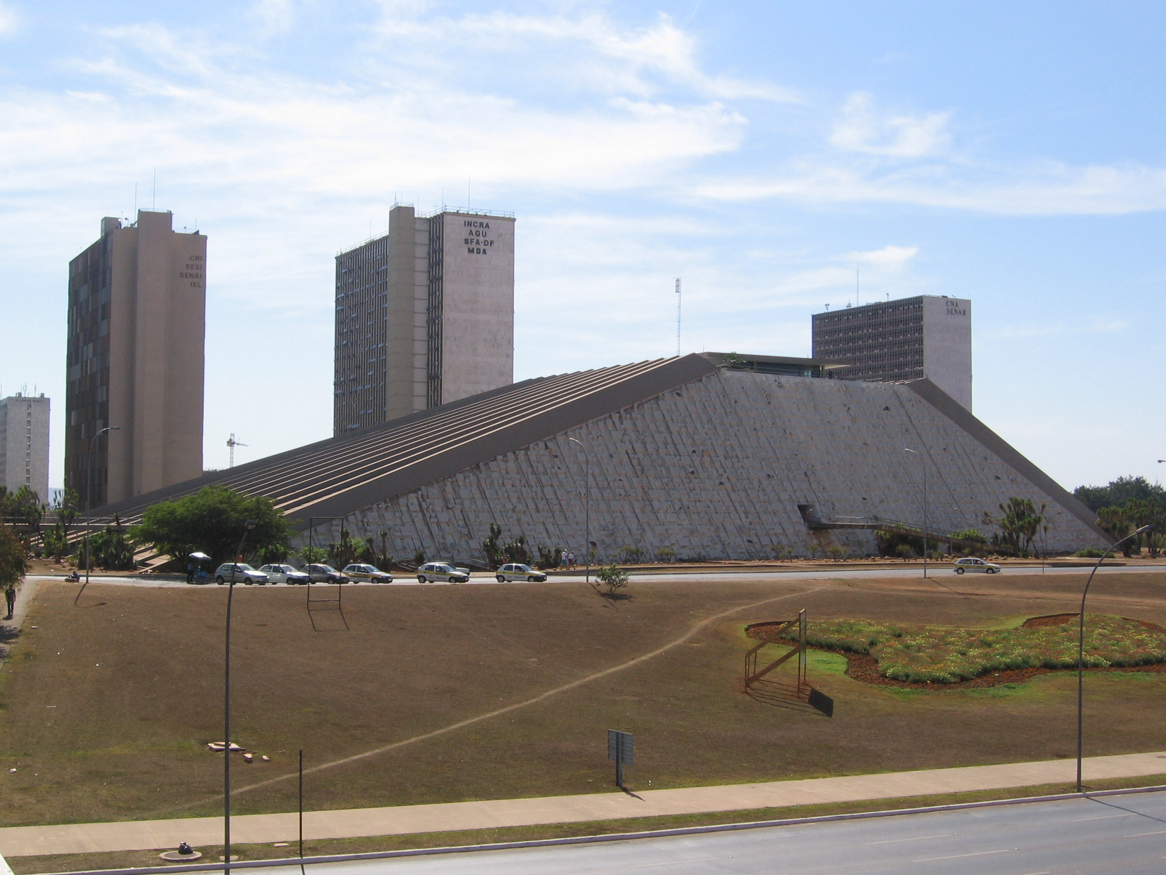 Teatro Nacional Cláudio Santoro, in Brasília, Brazil